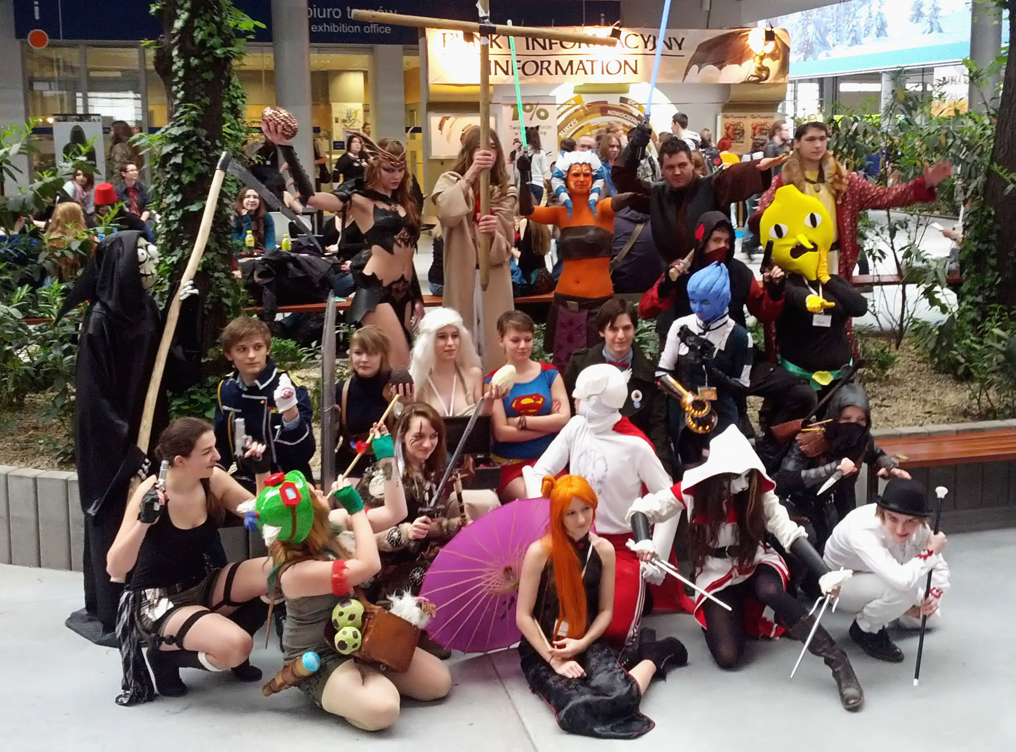 Przebrani uczestnicy podczas Festiwalu Fantastyki Pyrkon 2014